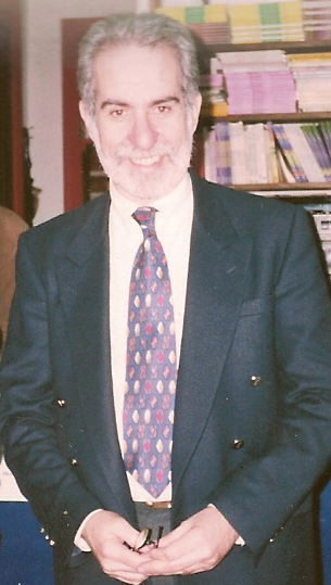 Pepe Eliashev, periodista de Argentina.